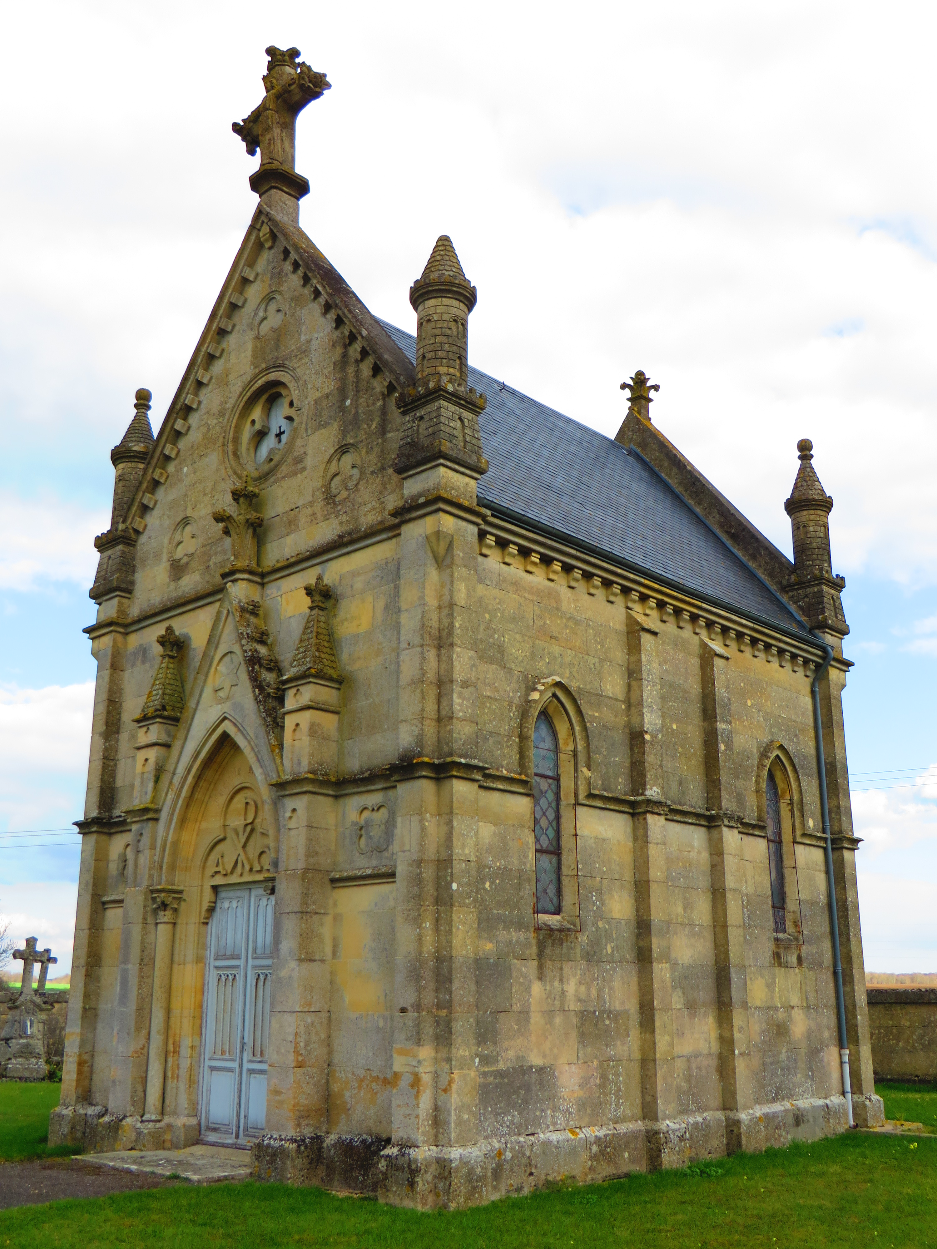 Louppy-le-Château La chapelle du cimetière